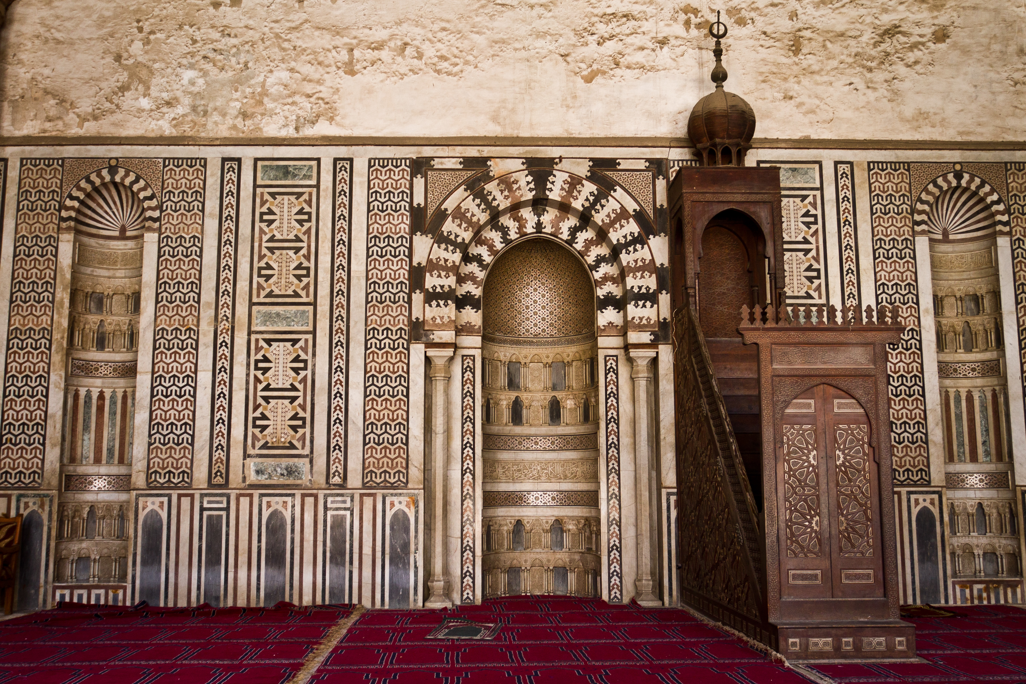 يقع هذا الجامع داخل قلعة صلاح الدين الايوبى ، ويوجد هذا المسجد على يسار الصاعد إلى جامع محمد على باشا الكبير . معلومات عن المسجد قد أمر بأنشائة الملك الناصر محمد بن قلاوون سنة 718 هـ / 1318 م ثم رغب فى توسيعه فهدمه وأعاد بناءة فى سنة 735 هـ / 1335 م . وتبلغ مساحة الجامع من الداخل 59 متر طولا × 53 متر عرضا ويعد تخطيطه من التخطيط الأول للمساجد فهو مربع الشكل يتكون من أربعة صفوف من العقود بينما تشتمل كل من الأروقة الثلاثة الأخرى على صفين من العقود ترتكز جميعها على أعمدة رخامية مختلقة الإحجام متنوعة التيجان وفتح فى خواصرها فتحات معقودة أعلى العقدة قصد بها التخفيف ، ويعلو وجهات الأروقة المشرفة على الصحن شرفات مسننة تنتهي عند كل ركن من أركانها الصحن بخوذة مضلعة محمولة على قاعدة مقرنصة . وتقوم أمام المحارب قبة أنشئت سنة 1935 م وحلت محل القبة القديمة سقطت فى وقت غير معلوم وترتكز هذه القبة على مربع بأركانه الأربعة مقرنصات كبيرة من الخشب وبأسفلها طراز خشبي مكتوب به بالخط البارز الكبير اسم الناصر محمد وتاريخ الإنشاء سنة 735 هـ ، وهذه القبة بقاعدتها محمولة على عقود مرتفعة تحملها عشرة أعمدة ضخمة من الجرانيت الأحمر . أما سقف الجامع فهو من الخشب على هيئة قصع كروية تحيط بها أشكال هندسية تحصر بينها نهود بارزة تكون فى مجموعها منظرا خلابا وقد ظهر هذا النوع من الأسقف فى الدولة الأيوبية ثم أنتشر انتشارا واسعا فى عهدي قلاوون وابنه الناصر محمد سواء بمصر او بفلسطين وقد قامت إدارة حفظ الآثار العربية بتجديد هذا السقف . وتدل بعض بقايا الرخام التي وجدت بالمحراب على أنة كان مكسوا بالرخام الملون المدقوق بزخارف دقيقة كما تدل مواضع لصق الرخام التي مازلت باقية حتى الآن على جدران الجامع الداخلية على أنها كانت مكسوة بوزرة رخامية جميلة بارتفاع أكثر من خمسة أمتار .